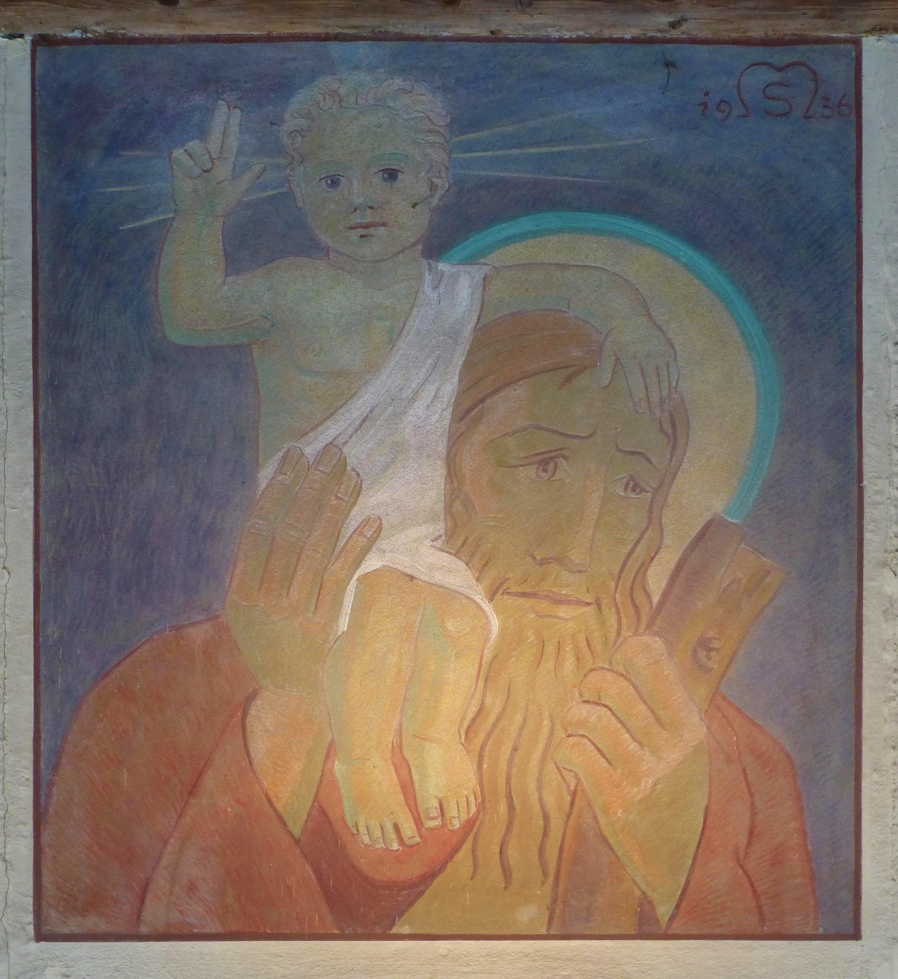 Fresko des Heiligen Christophorus über dem Eingang der Lorettokapelle in Lustenau